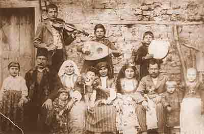 Струшко семејство - почеток на XX век